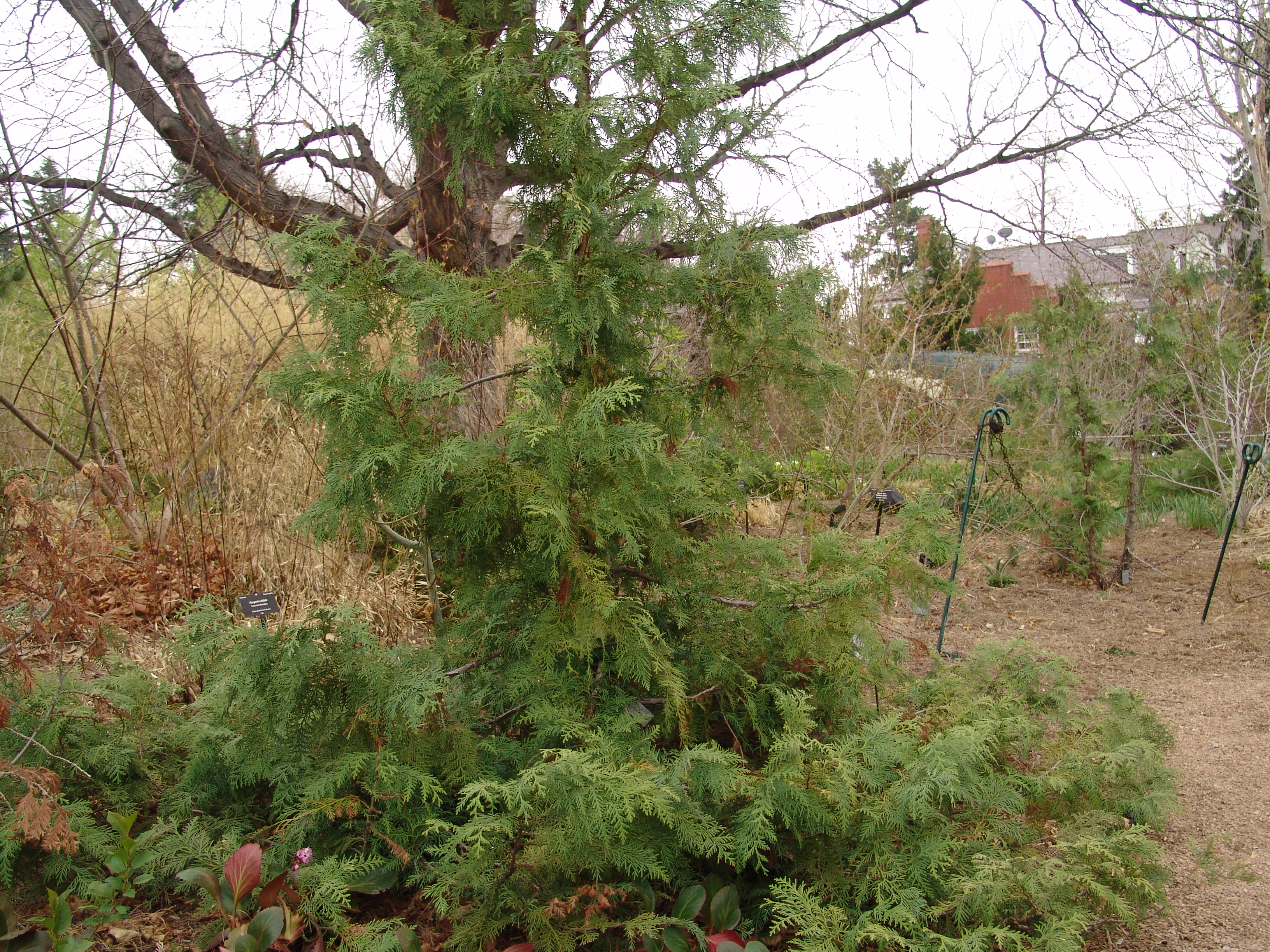 Thuja koraiensis, Denver Botanical Garden